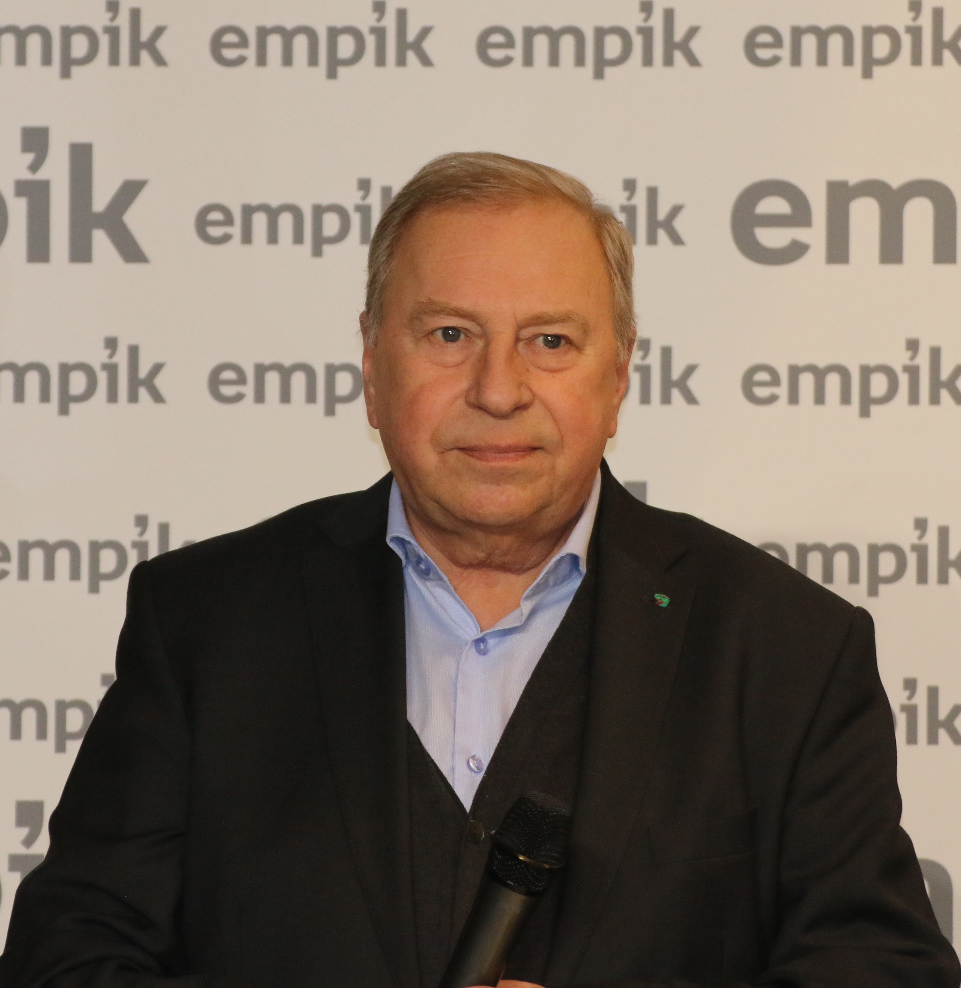 Jerzy Stuhr podczas spotkania autorskiego w Galerii Bałtyckiej 27 stycznia 2018 r.